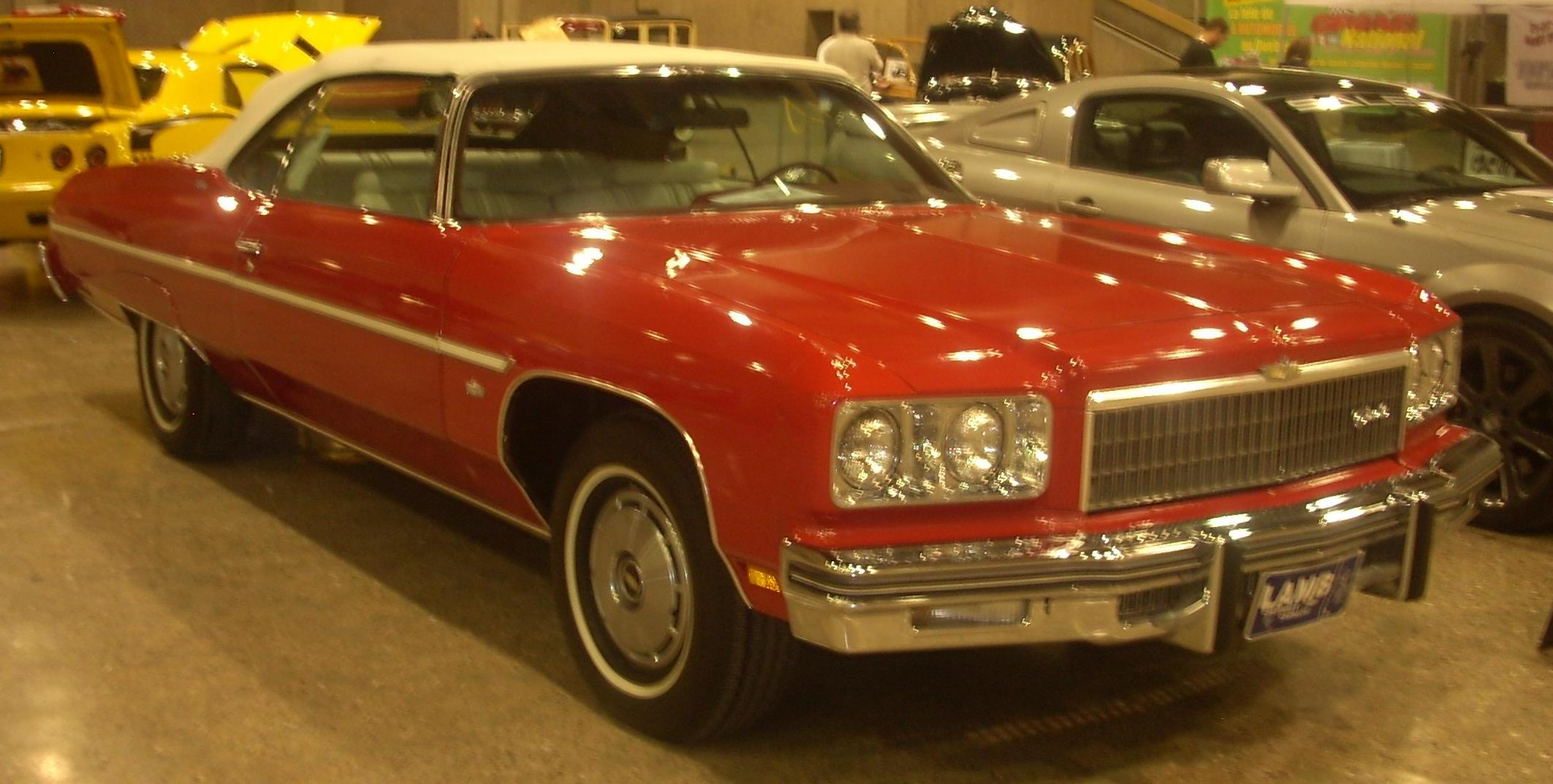 1975 Chevrolet Caprice Classic photographed at Auto classique Montréal 2008.